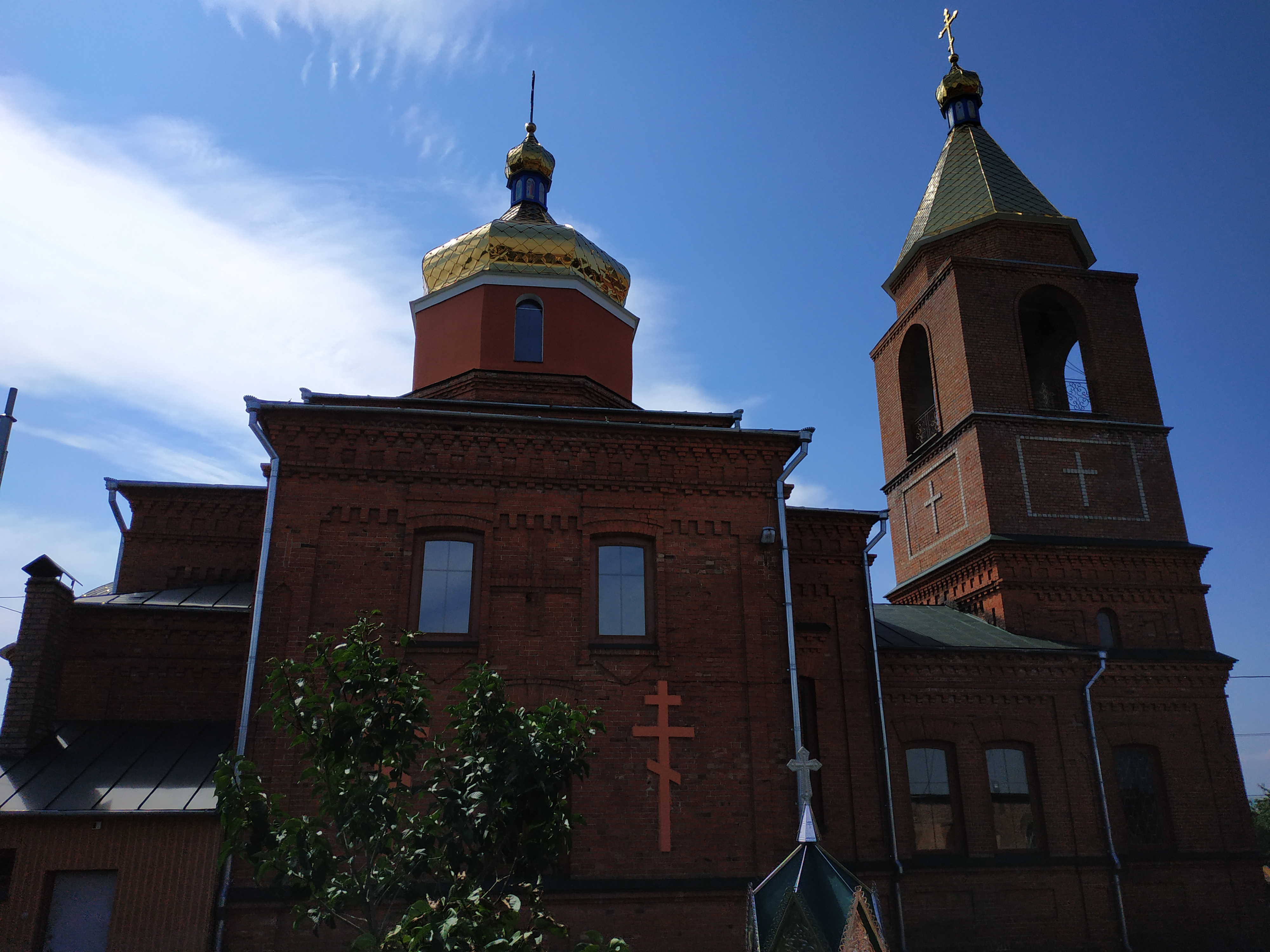 Свято-Покровська церква у мікрорайоні Лезнево